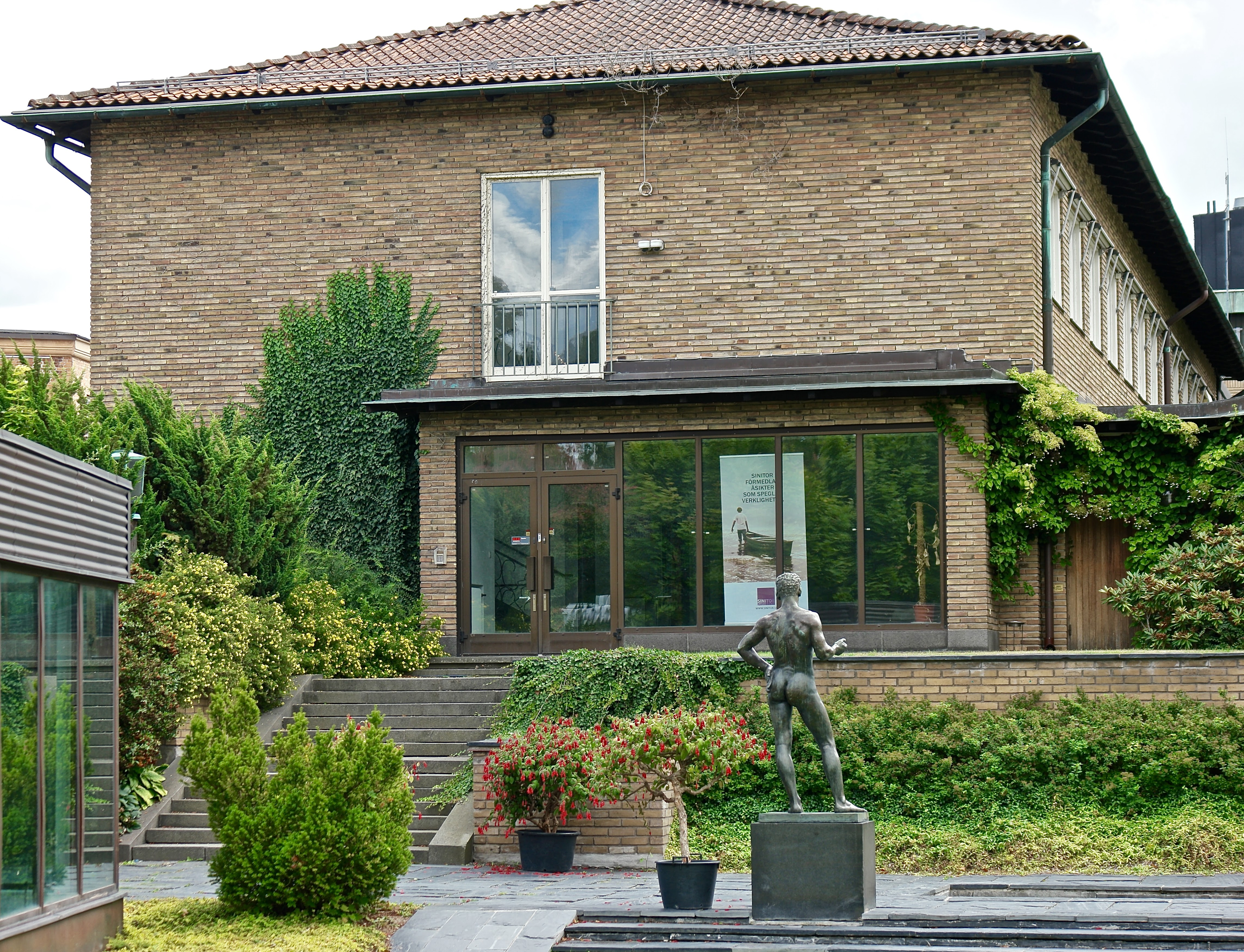 Bild tagen från parken aug 2016